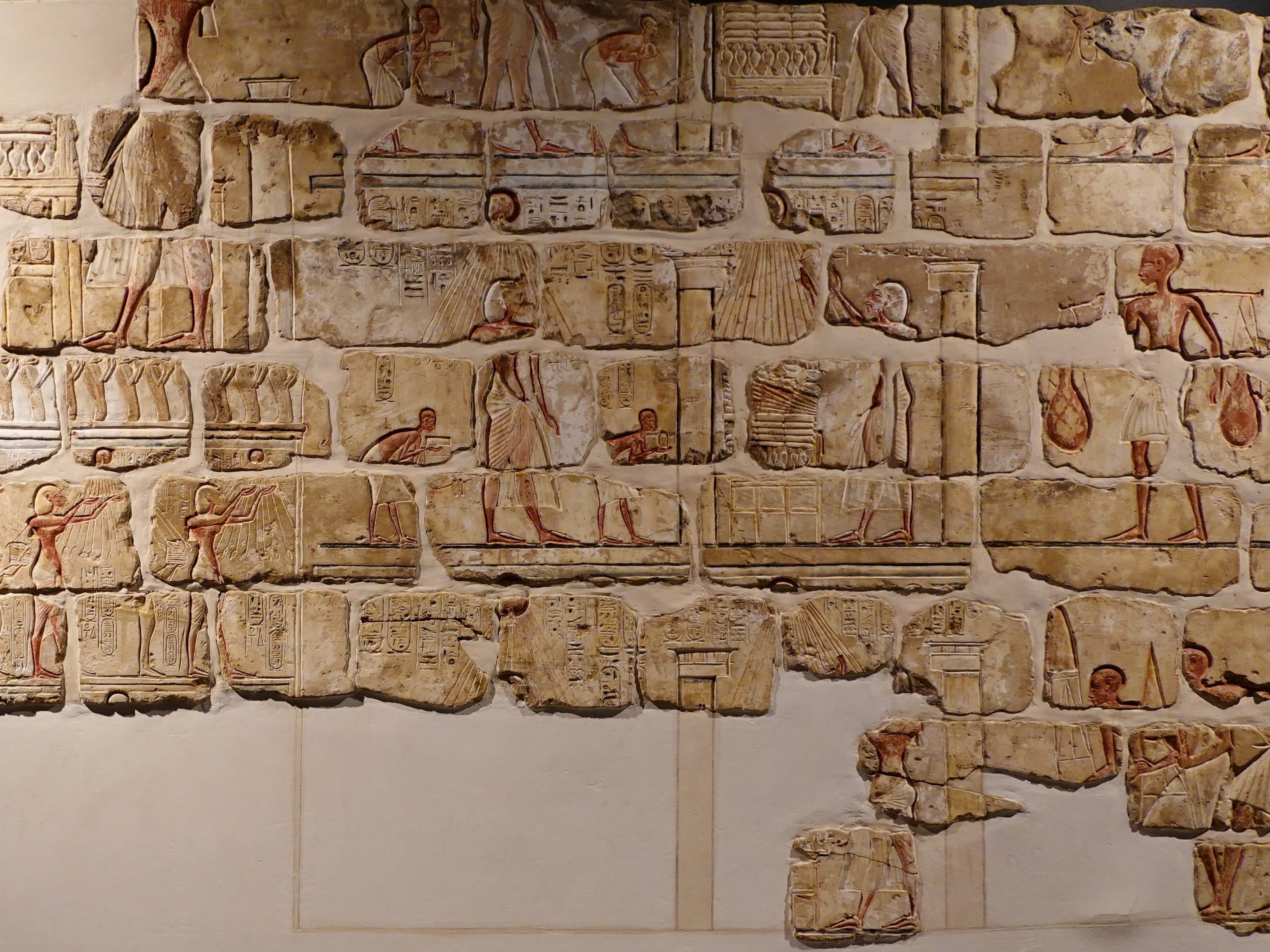 Talatat aus dem Gem-pa-Aton in Karnak, errichtet in den ersten Regierungsjahren des Königs Echnaton (Sandstein, 18. Dynastie), gefunden im 9. Pylon des Amun-Tempels von Karnak, ausgestellt im Luxor-Museum, Ägypten